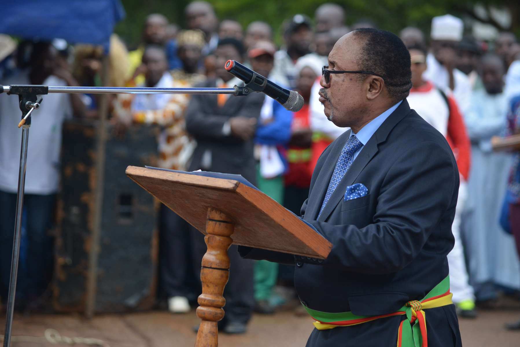 Kwemo